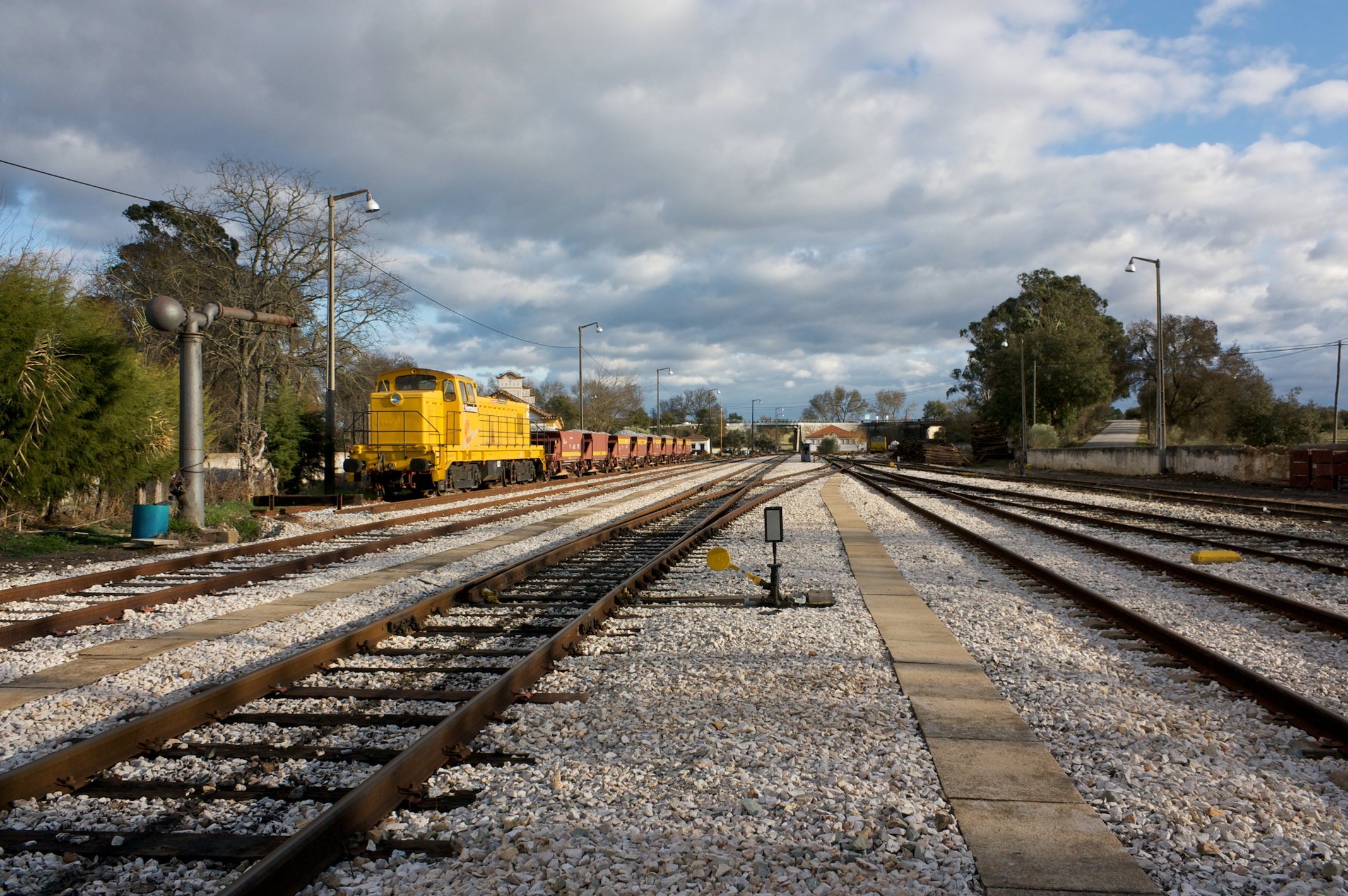 sentido Badajoz e Évora. Tipo: E [Estação] Local: Portalegre-Gare [Linha do Leste, PK 216 • Linha de Évora, PK 239] Data e hora: 9 de Dezembro de 2008 [15h32]